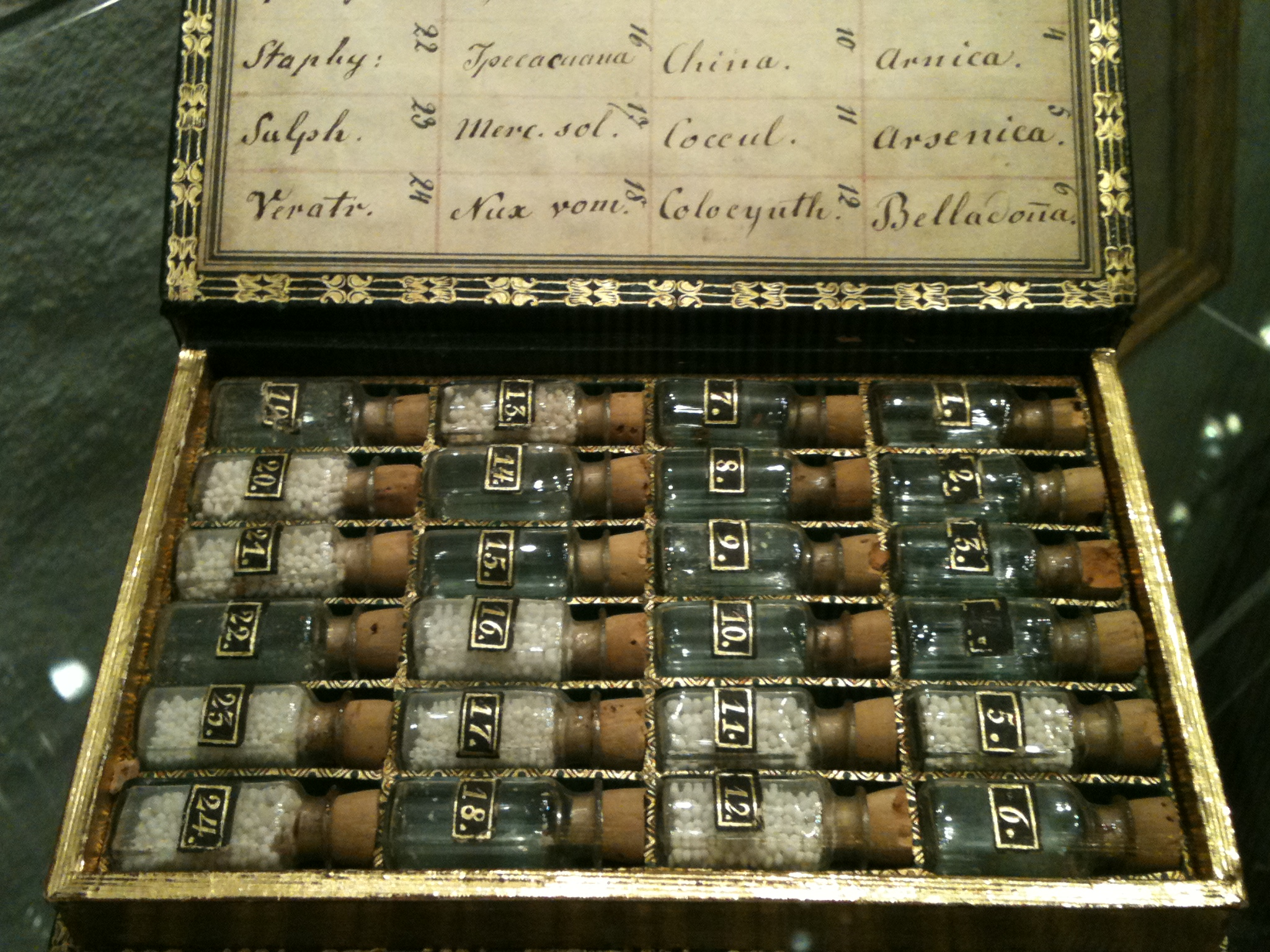 Deutschland - Baden-Württemberg - Heidelberg: Deutsches Apothekenmuseum, Homöopathische Taschenapotheke (1835-1843) aus dem Besitz Samuel Hahnemanns, der sie in seinen letzten Lebensjahren in Paris benutzte